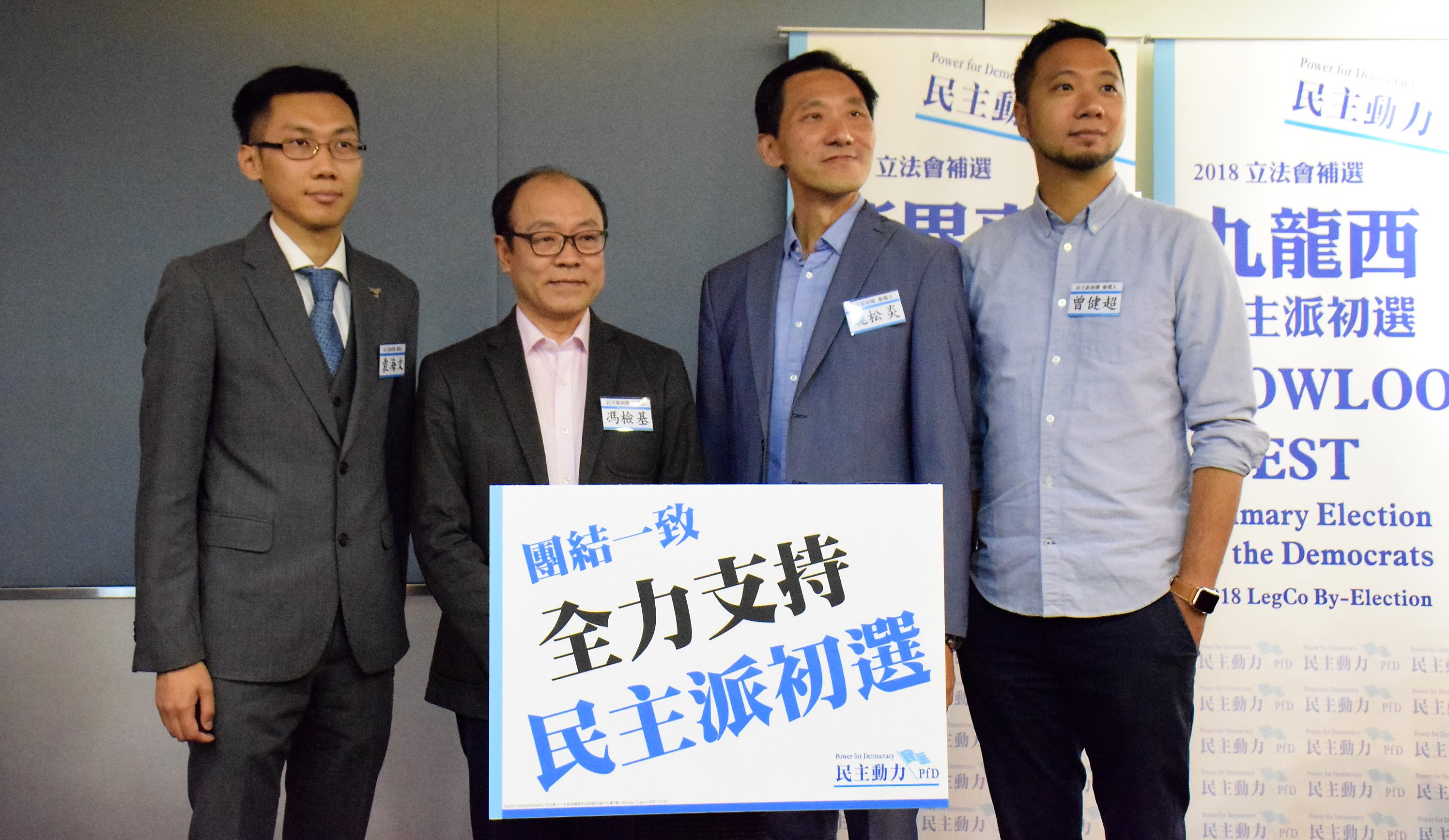 參與民主派九龍西初選的3名參選人(左起)民主黨區議員袁海文、民協前立法會議員馮檢基、前立法會議員姚松炎，以及宣佈退選的前公民黨成員曾健超。（美國之音湯惠芸